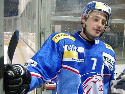 Mark Streit im Hallenstadion, Zürich